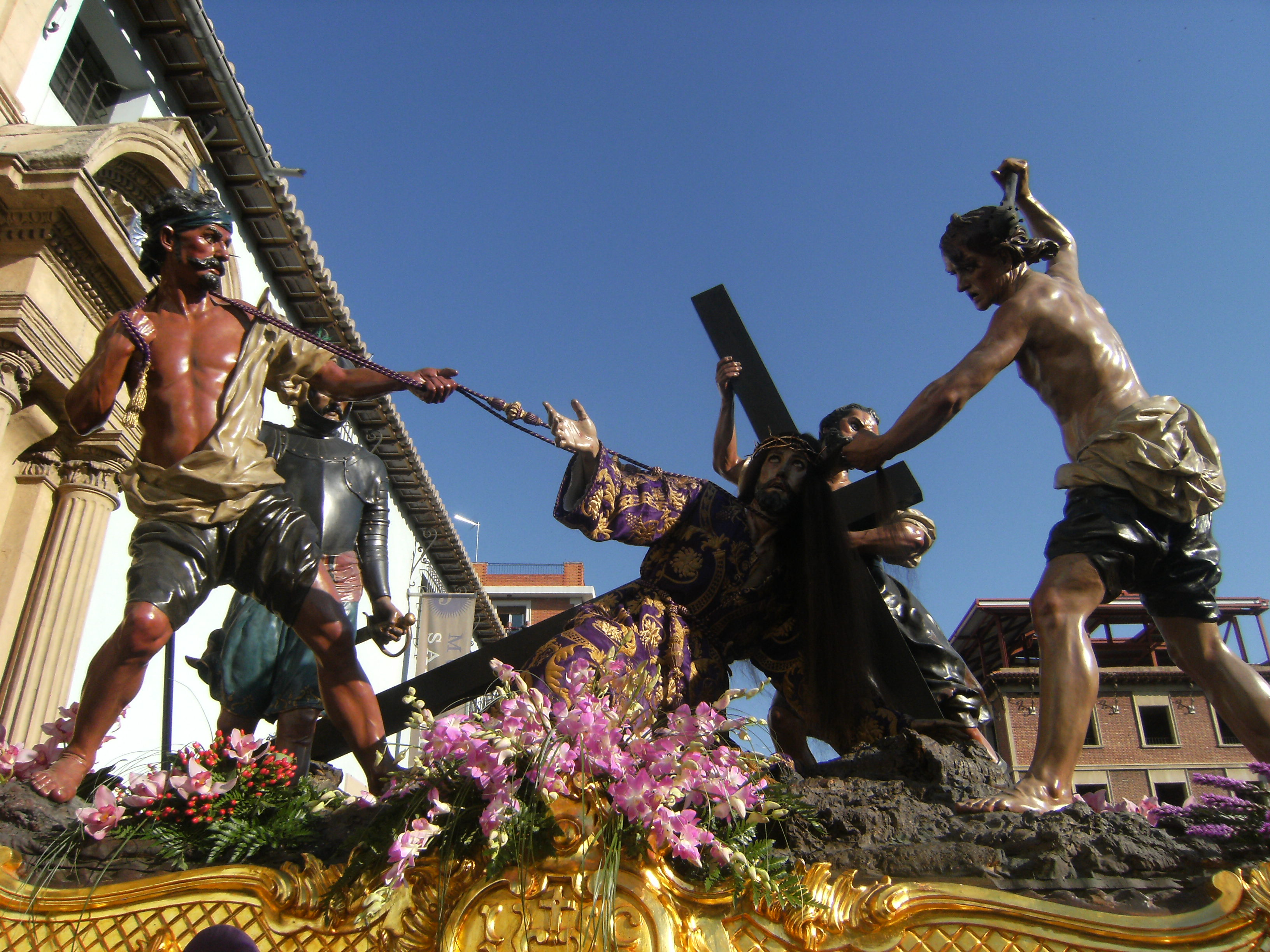 Paso de La Caída, obra de Francisco Salzillo de 1752, perteneciente a la Cofradía de Jesús Nazareno de Murcia (Región de Murcia, España)